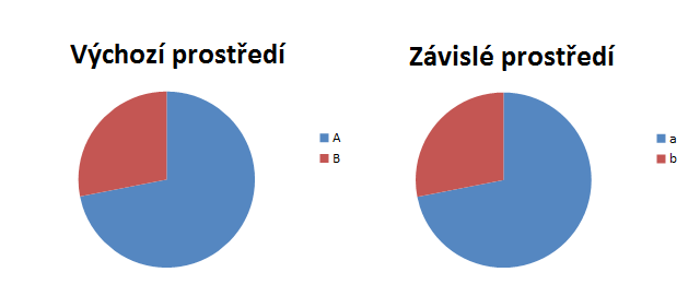 Grafické znázornění jak funguje analogie